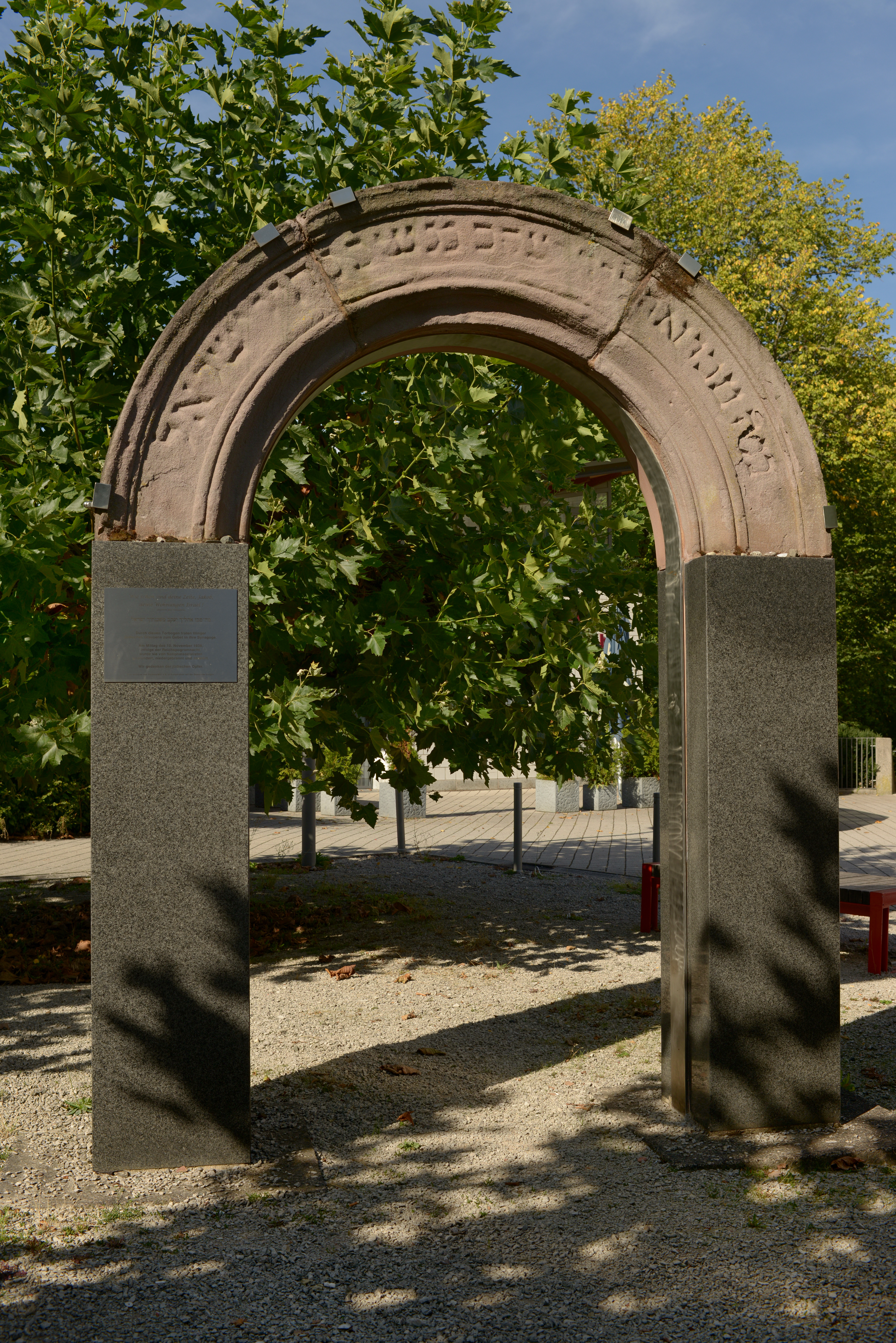 Torbogen der ehemaligen Synagoge in Illingen, Saarland. Die Synagoge wurde beim Novemberpogrom 1938 am 10. November geplündert und in Brand gesteckt, nur der Torbogen blieb erhalten. Der Bogen lagert auf zwei Mamorstelen und wurde von dem Illinger Bildhauer und Maler Armin Hüwels erbaut. Er ist das Ergebnis eines Kunstwettbewerbs 1996/97 zum Gedenken an die Illinger Juden. (Quelle: Gemeinde Illingen (Hrsg.): Illingen – ein Rundgang. Verlag Schäfer. 2. aktualisierte Auflage, Illingen 2005, ISBN: 3-9804733-3-3). Der Torbogen trägt die hebräische Inschrift: "Wie schön sind deine Zelte, Jakob, deine Wohnungen Israel".